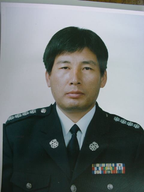 경상남도 소방 역사사진